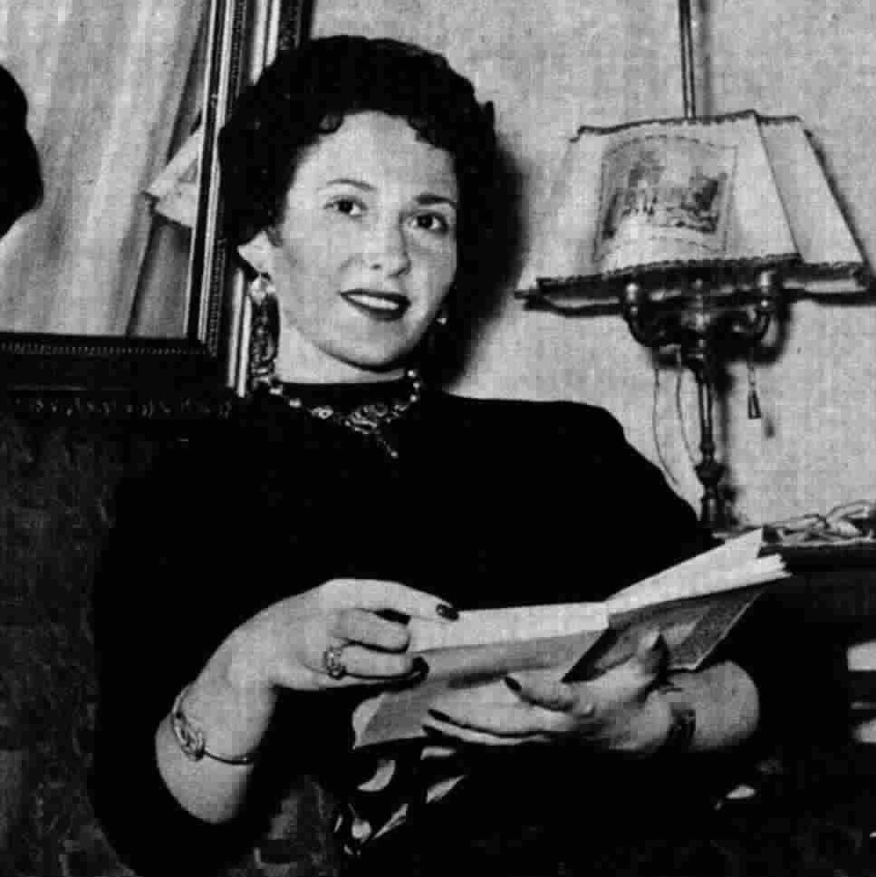 Soprano Elena Rizzieri